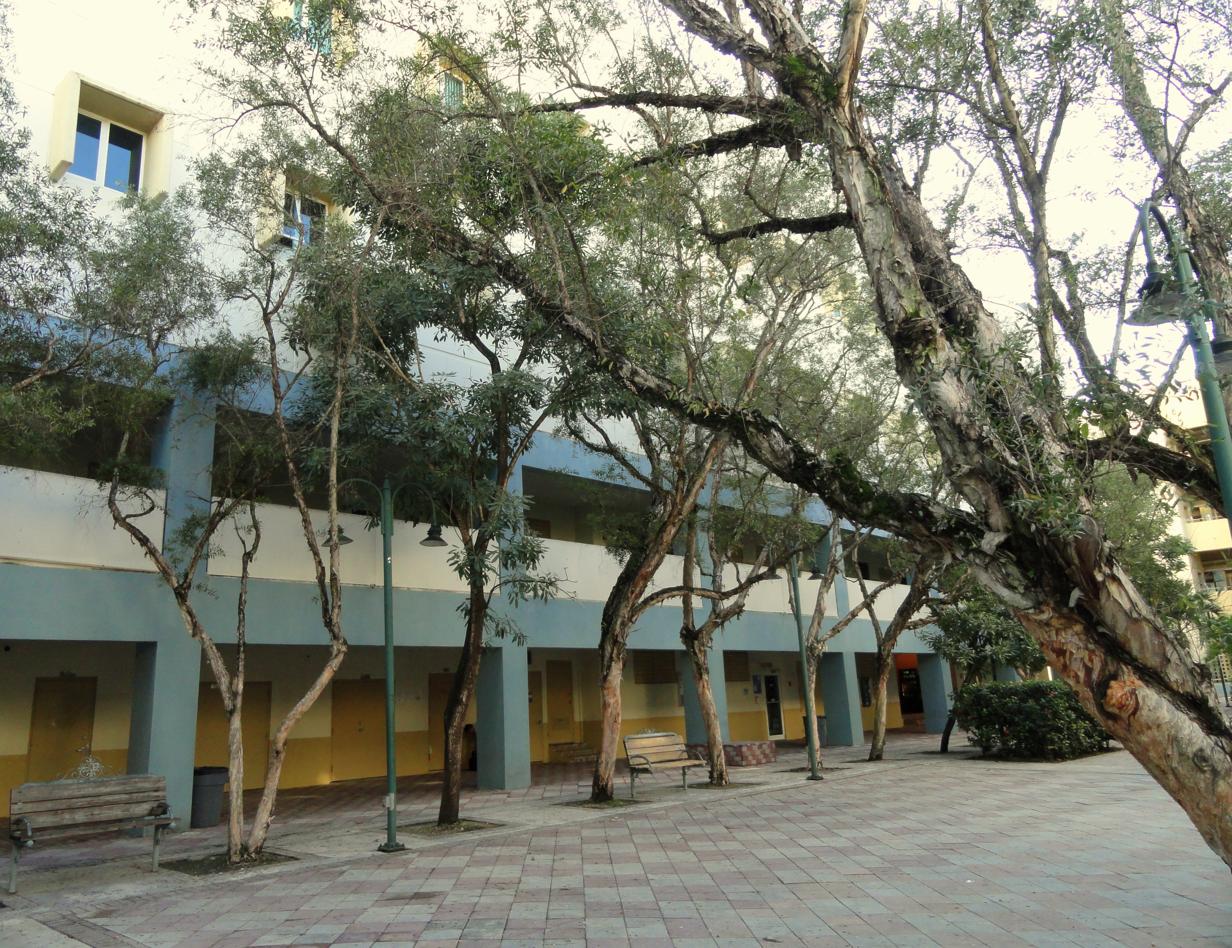 Polytechnic University of Puerto Rico, 377 Ponce de León Avenue, Hato Rey, Puerto Rico.